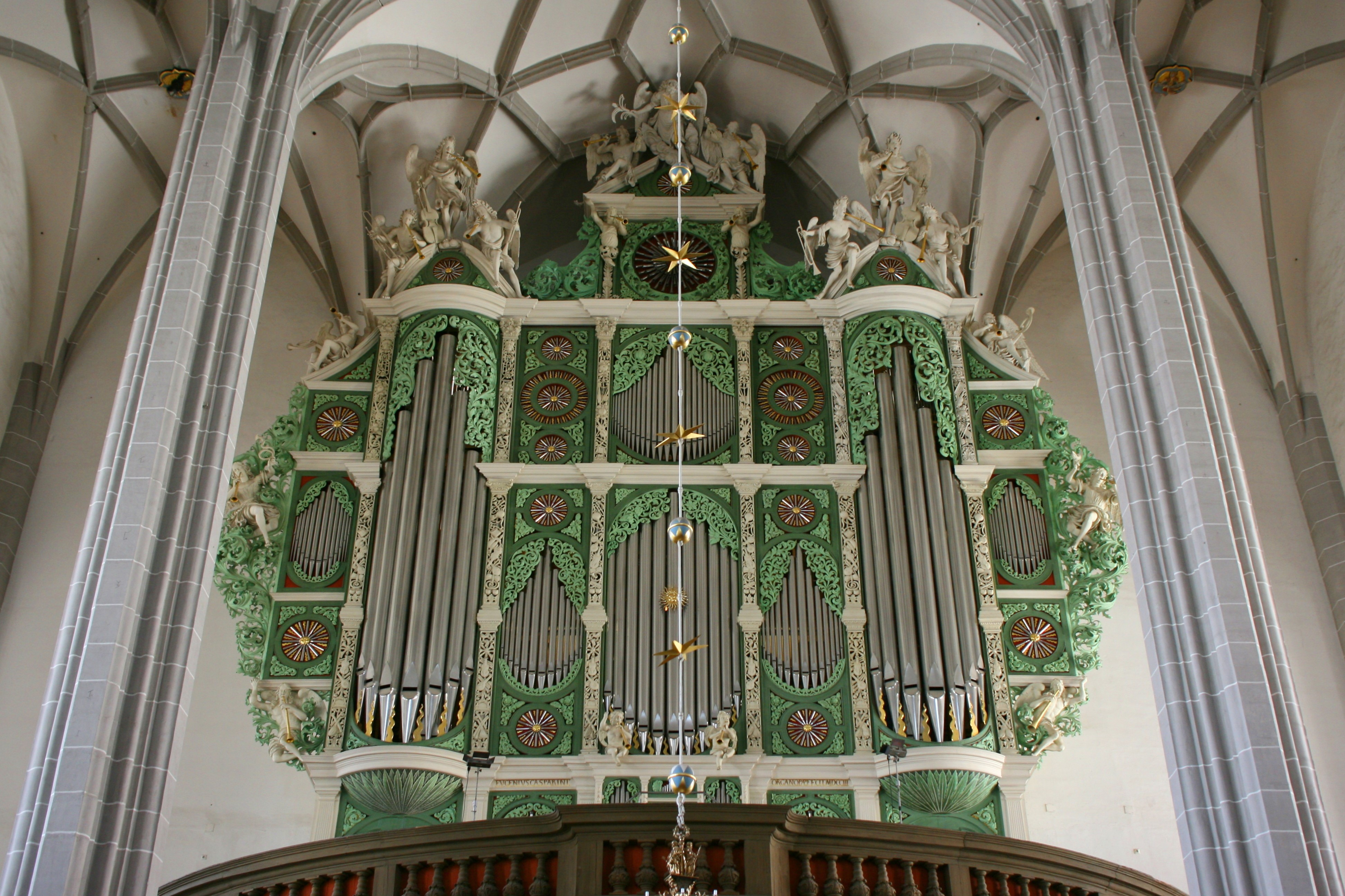 St. Peter und Paul, Bei der Peterskirche in Görlitz